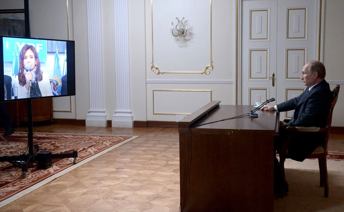 В режиме телемоста Владимир Путин и Президент Аргентинской Республики Кристина Фернандес де Киршнер дали старт началу вещания телеканала Russia Today на испанском языке в эфирной сети Аргентины.